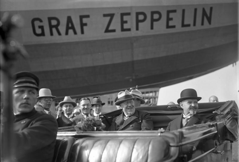 Der jubelnde Empfang des "Graf Zelppelin" auf dem Luftschiffhafen in Berlin-Staaken! Die feierliche Einholung des Führers des "Graf Zeppelin" Dr. Eckener (links) durch den Berliner Bürgermeister Scholz (rechts) im Auto nach der glücklichen Landung auf dem Luftschiffhafen in Berlin-Staaken.